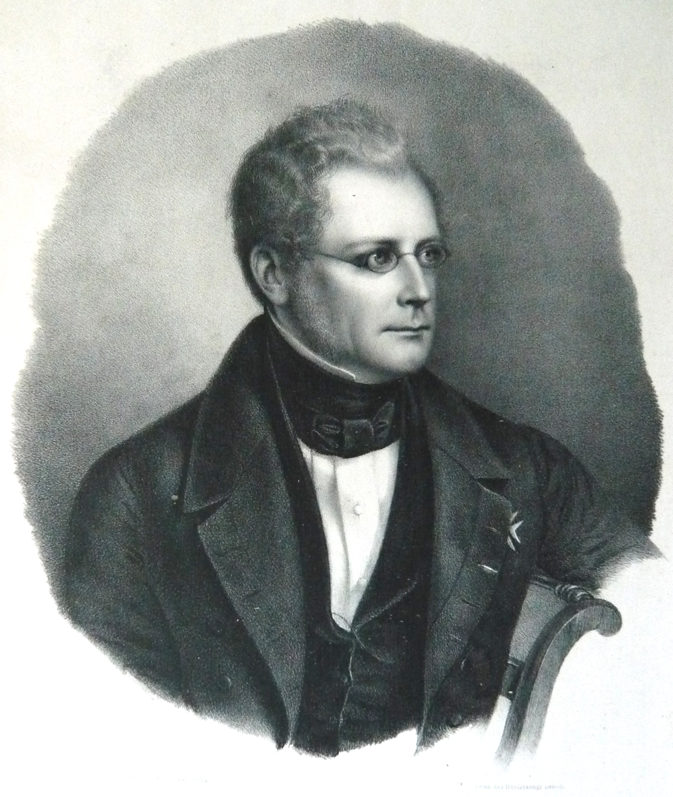 Wolf Heinrich von Baudissin, gezeichnet von August Grahl 30. Januar 1839; Gerd. bei Hanistaengl, Dresden